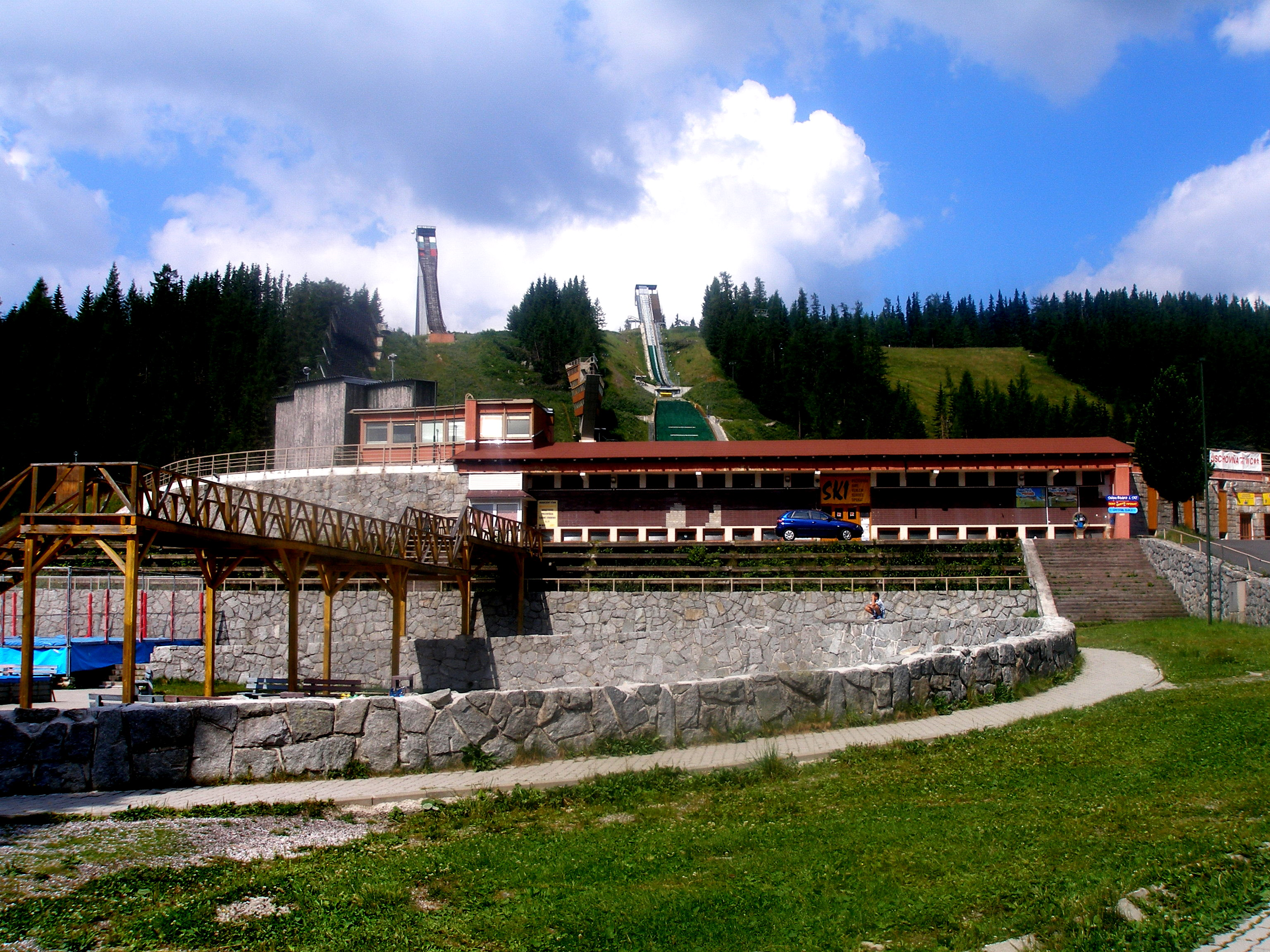 Tatranská osada Štrbské Pleso